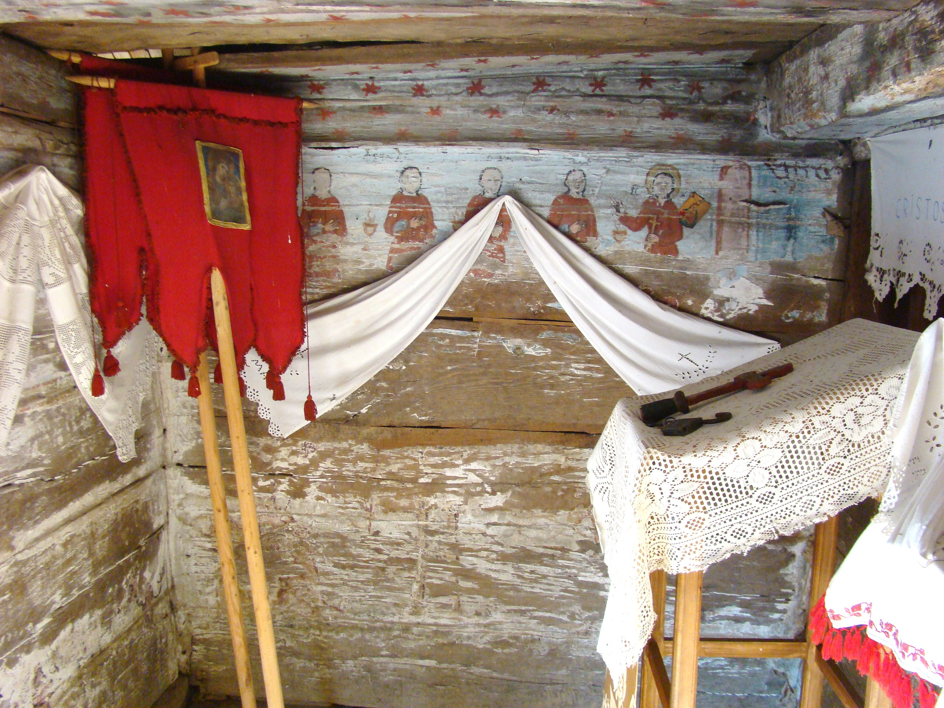 Biserica de lemn "Cuvioasa Paraschiva" , sat STEJERA; comuna MIREŞU MARE